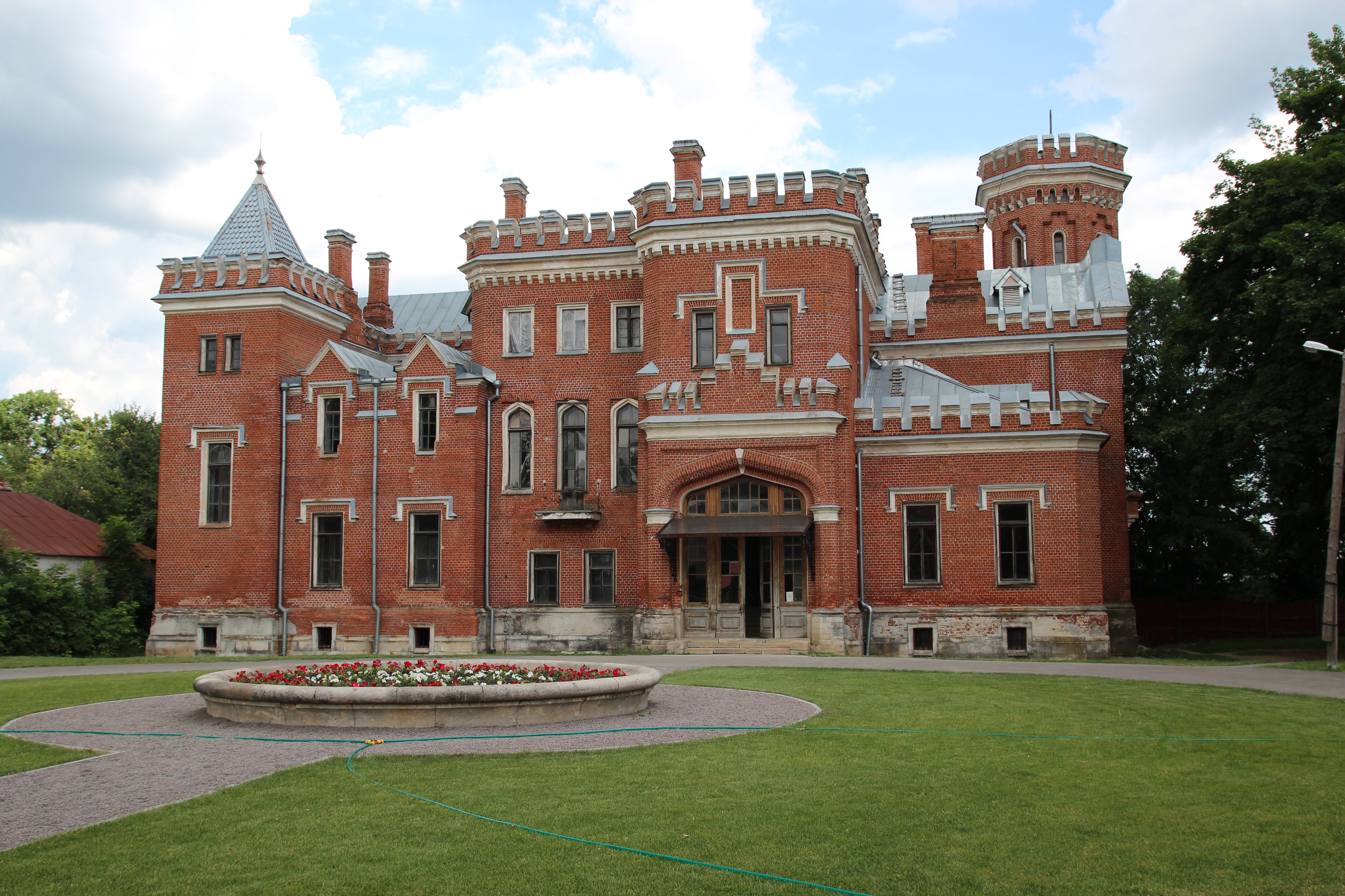 Рамонский дворец